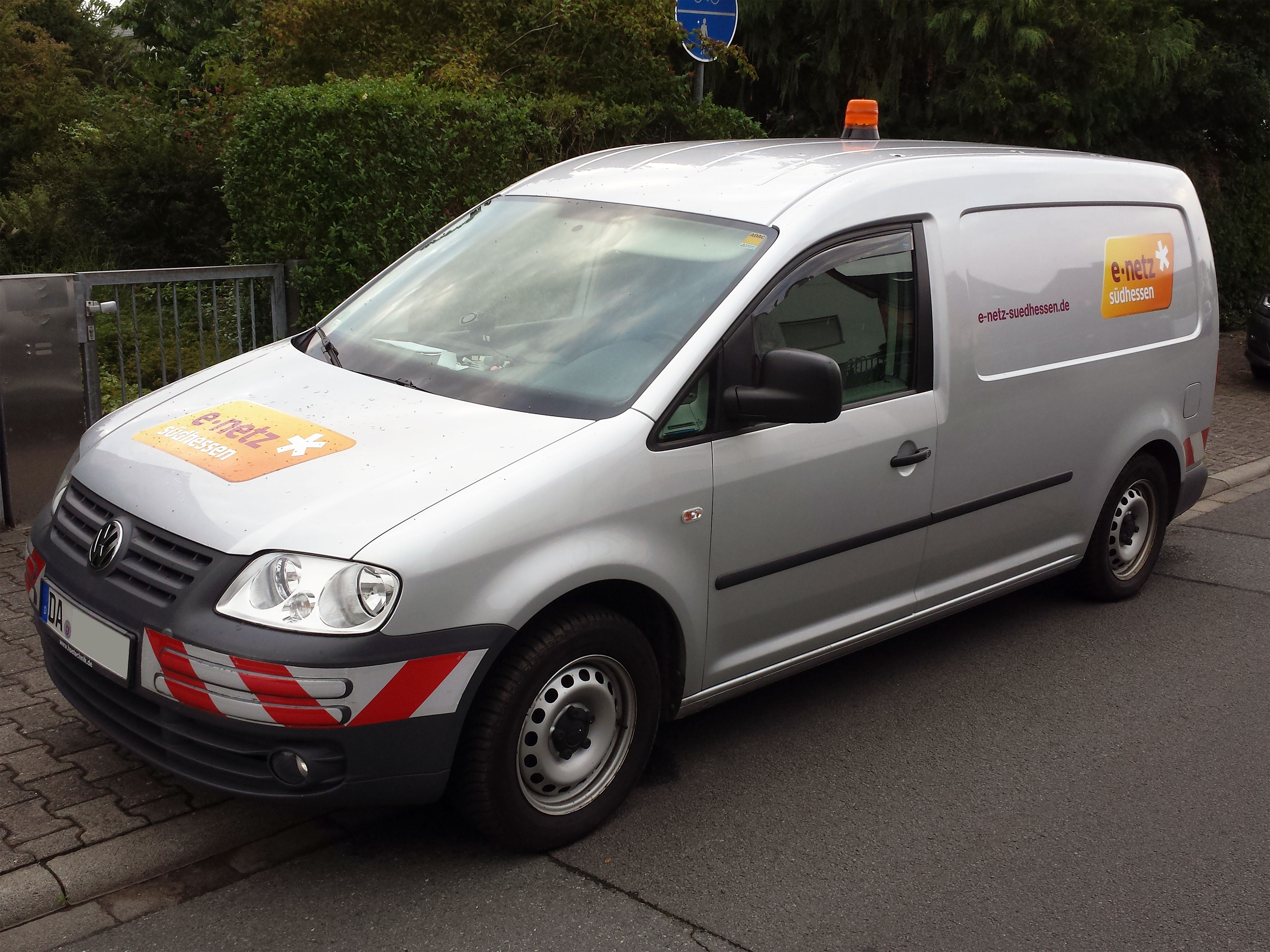 Fahrzeug von E-Netz Südhessen